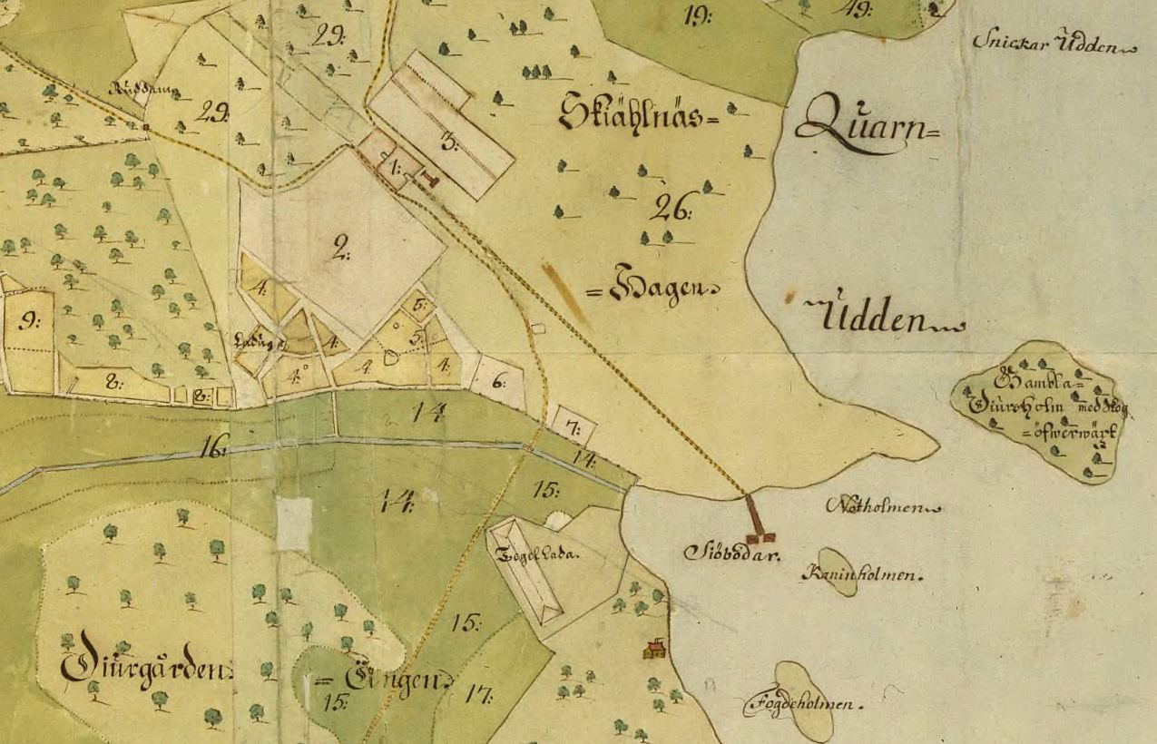 Del av Djursholm visande omgivningar kring Djursholms slott med dagens Samsöviken med öarna Fogdeholmen (Samsö) och Kaninholmen (Vågaskär)